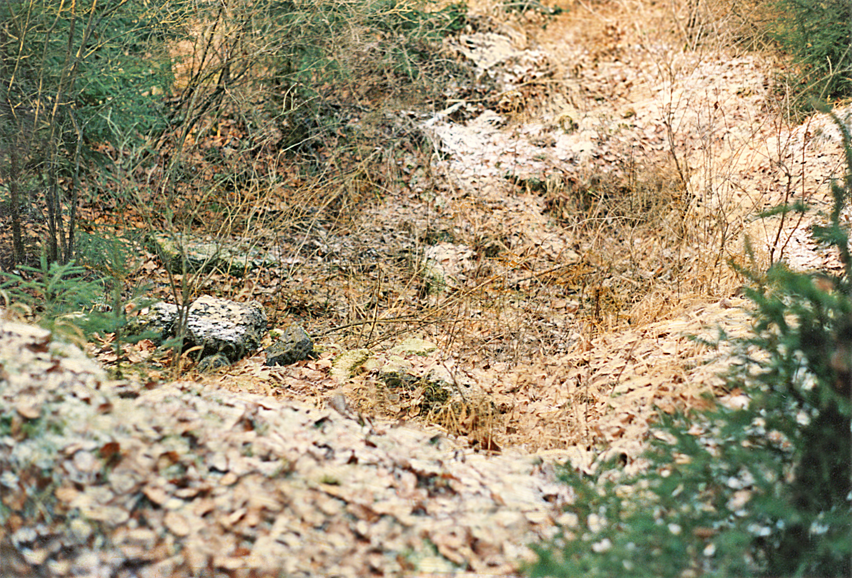 Die verfallenen Überresten des Limeswachturms Wp 14/54 an der Rätischen Mauer, Bayern. Zustand Januar 1993.